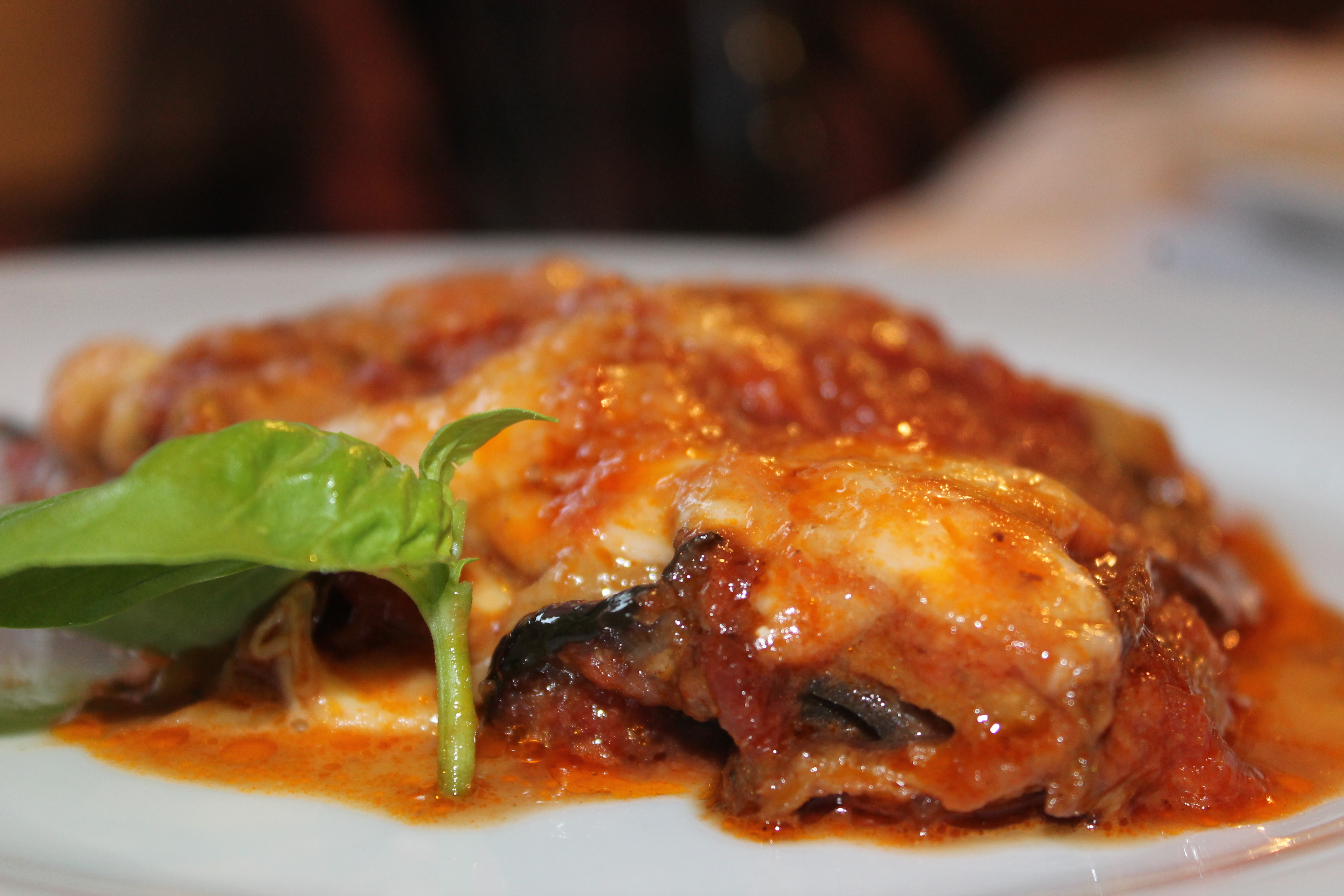 Una parmigiana di melanzane alla napoletana